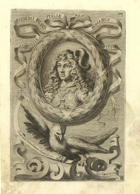 Retrato del Rey Adalgiso